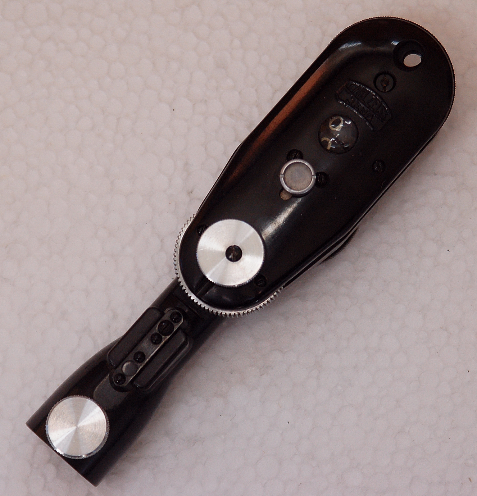 Carl Zeiss Jena Ophthalmoscope